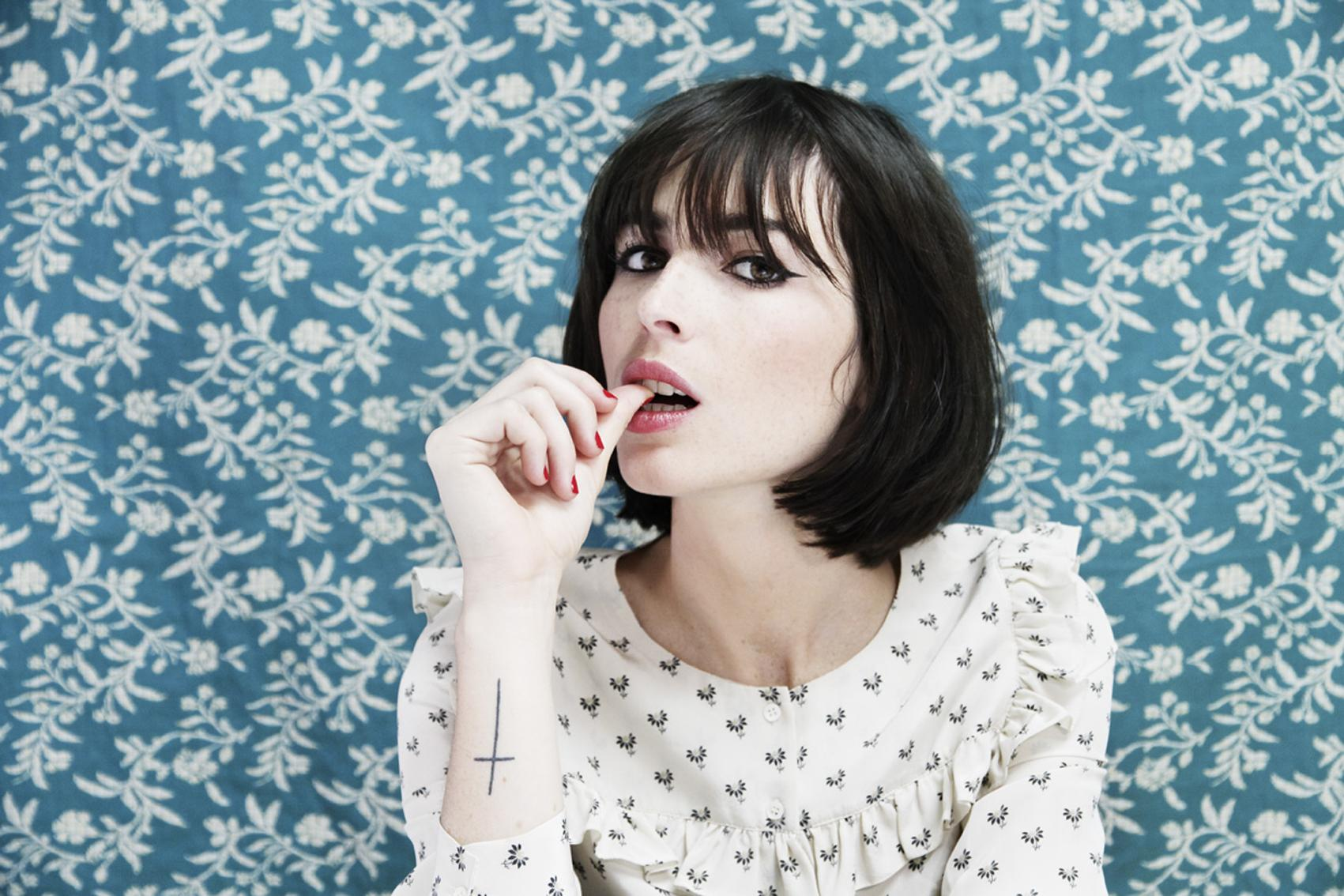 Liza Manili